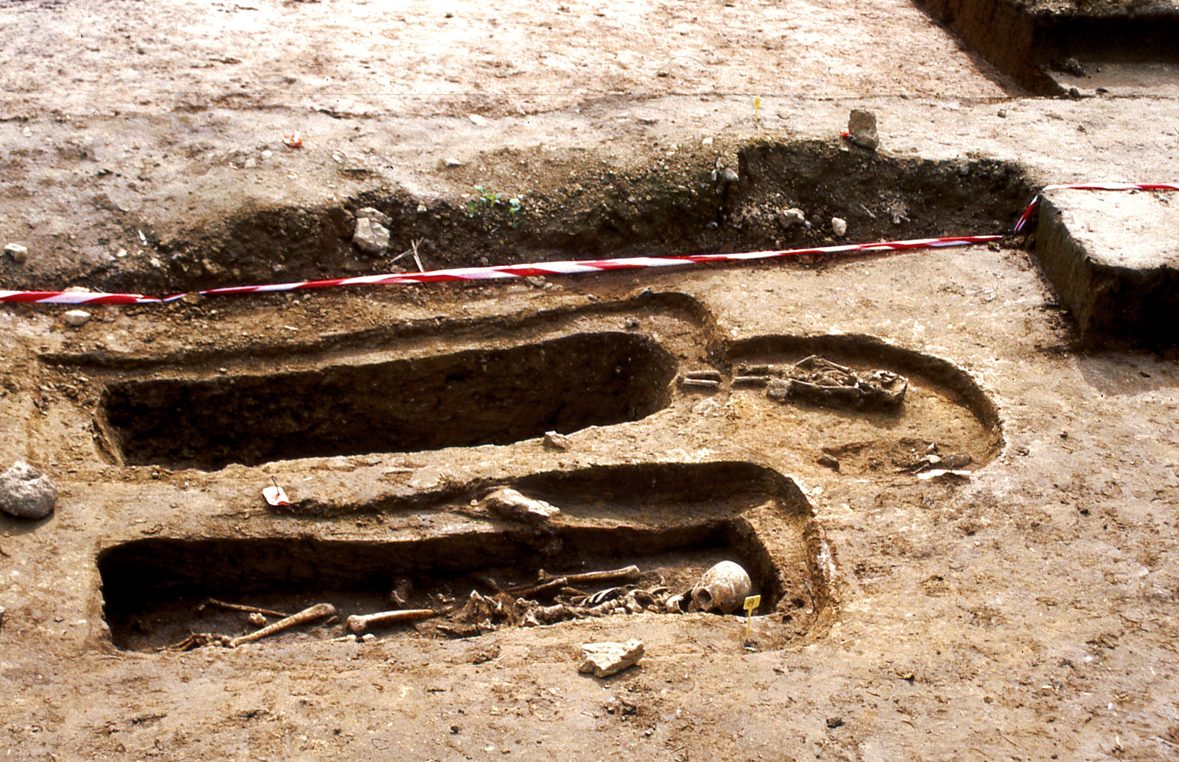 Ausgrabung an der Wüstungskirche Vriemeensen bei Meensen, Gemeinde Scheden, Südniedersachsen. Grablege an der Kirche. Tag des offenen Denkmals 1995 Scan vom Diapositiv